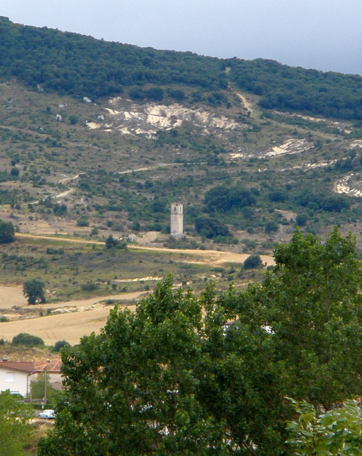 Otxate (Condado de Treviño, Burgos)